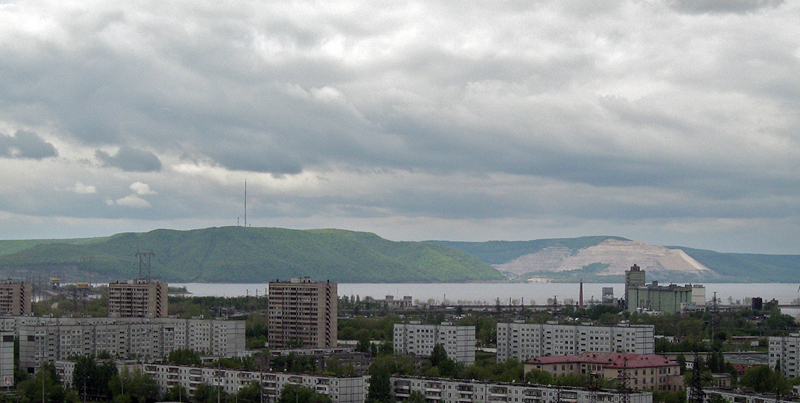 Жигулёвские горы со стороны Тольятти